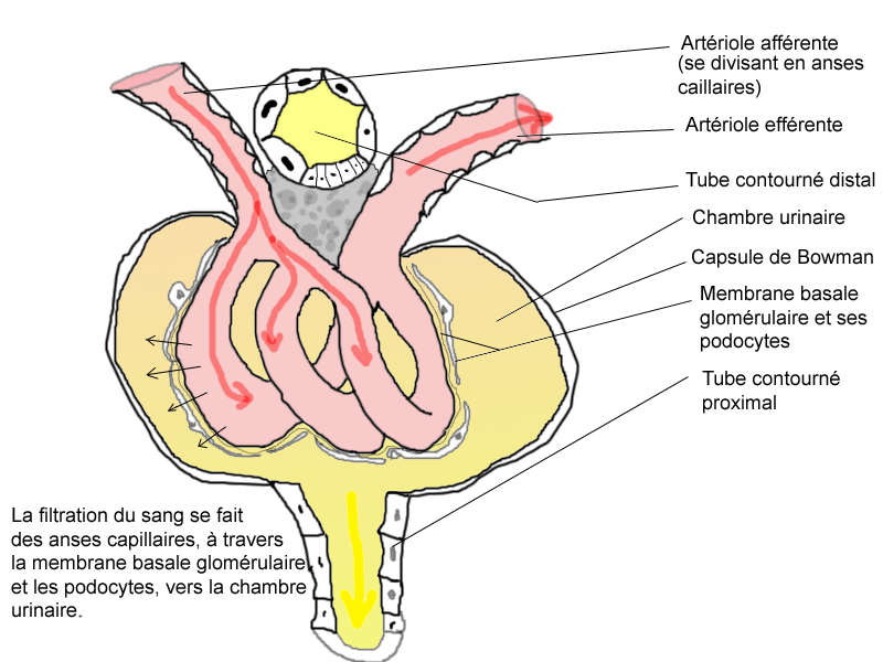 Histologie et physiologie glomérulaire, vue pseudo-tridimensionnelle